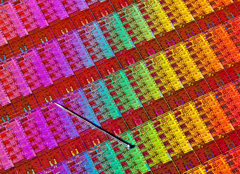 Процесор у масштабі